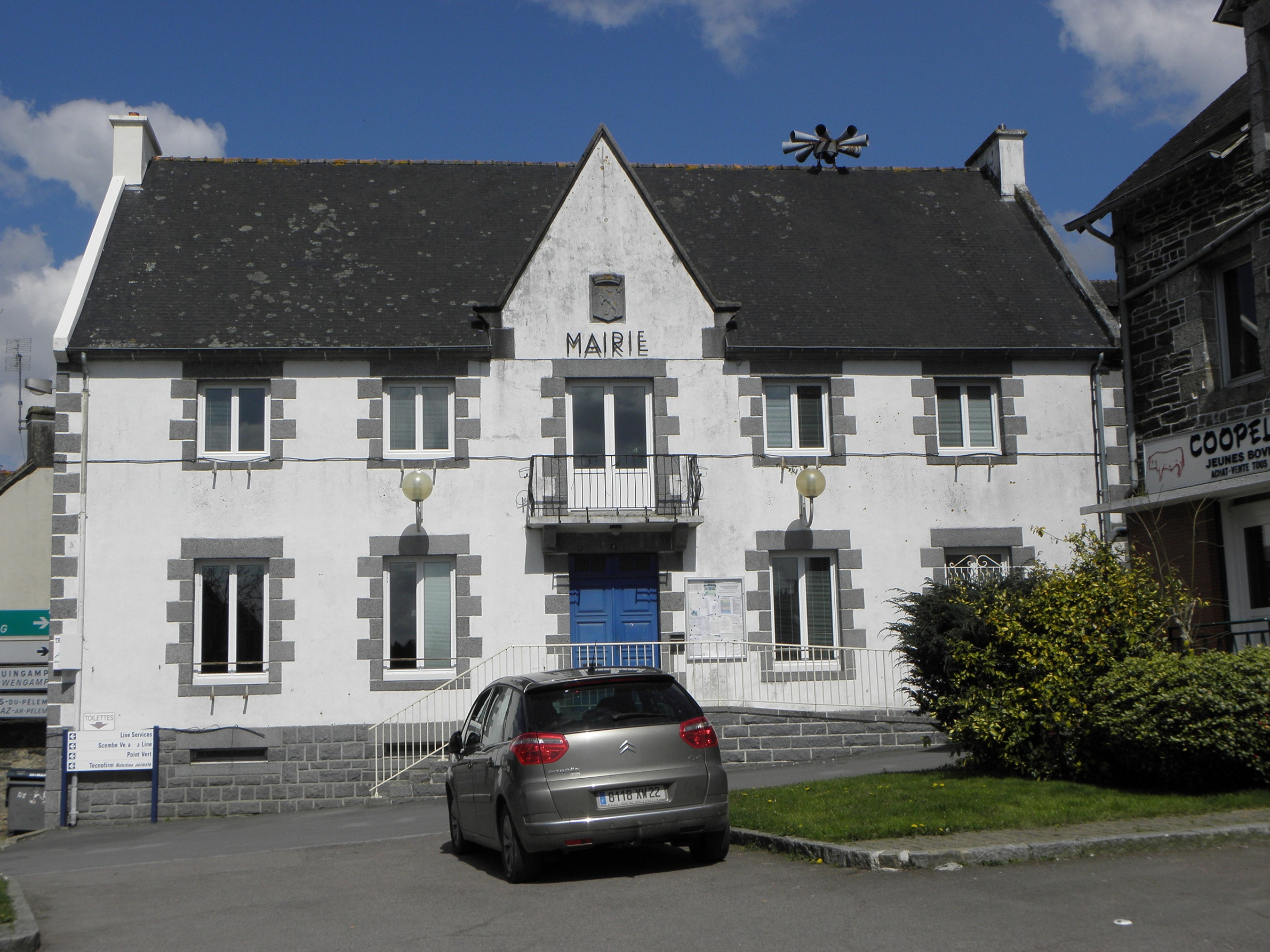 Mairie de Corlay (22).